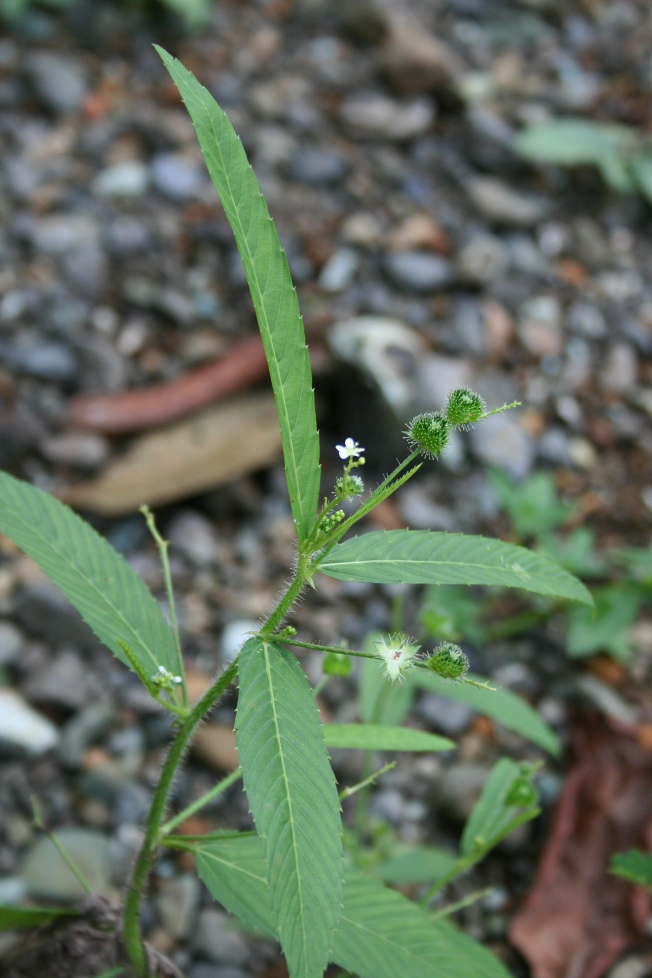 Caperonia palustris, Wolfsmilchgewächse (Euphorbiaceae) - Costa Rica: Prov. Puntarenas, La Gamba NW Golfito, Valle Bonito